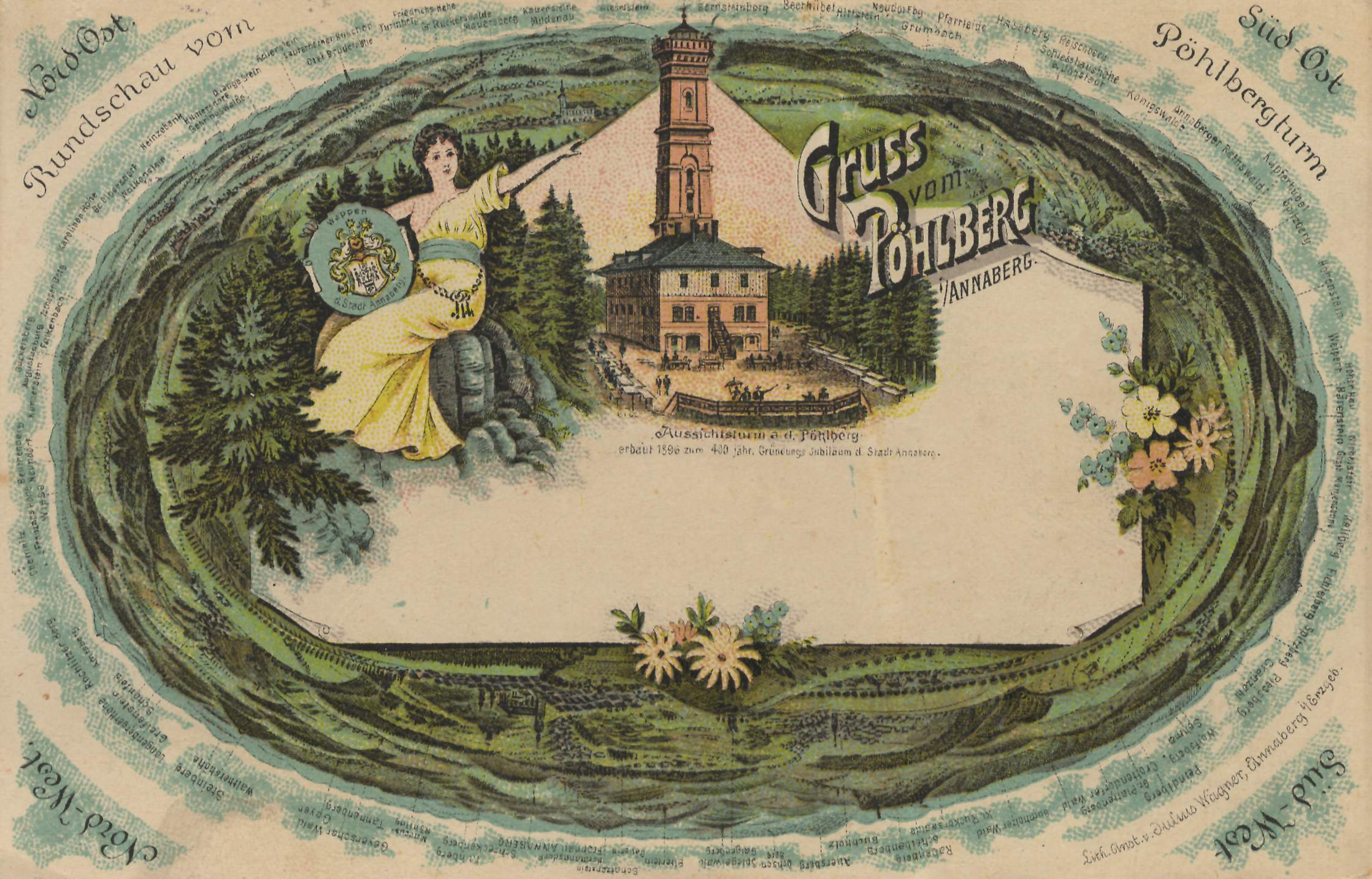 Rundschau vom Pöhlbergturm